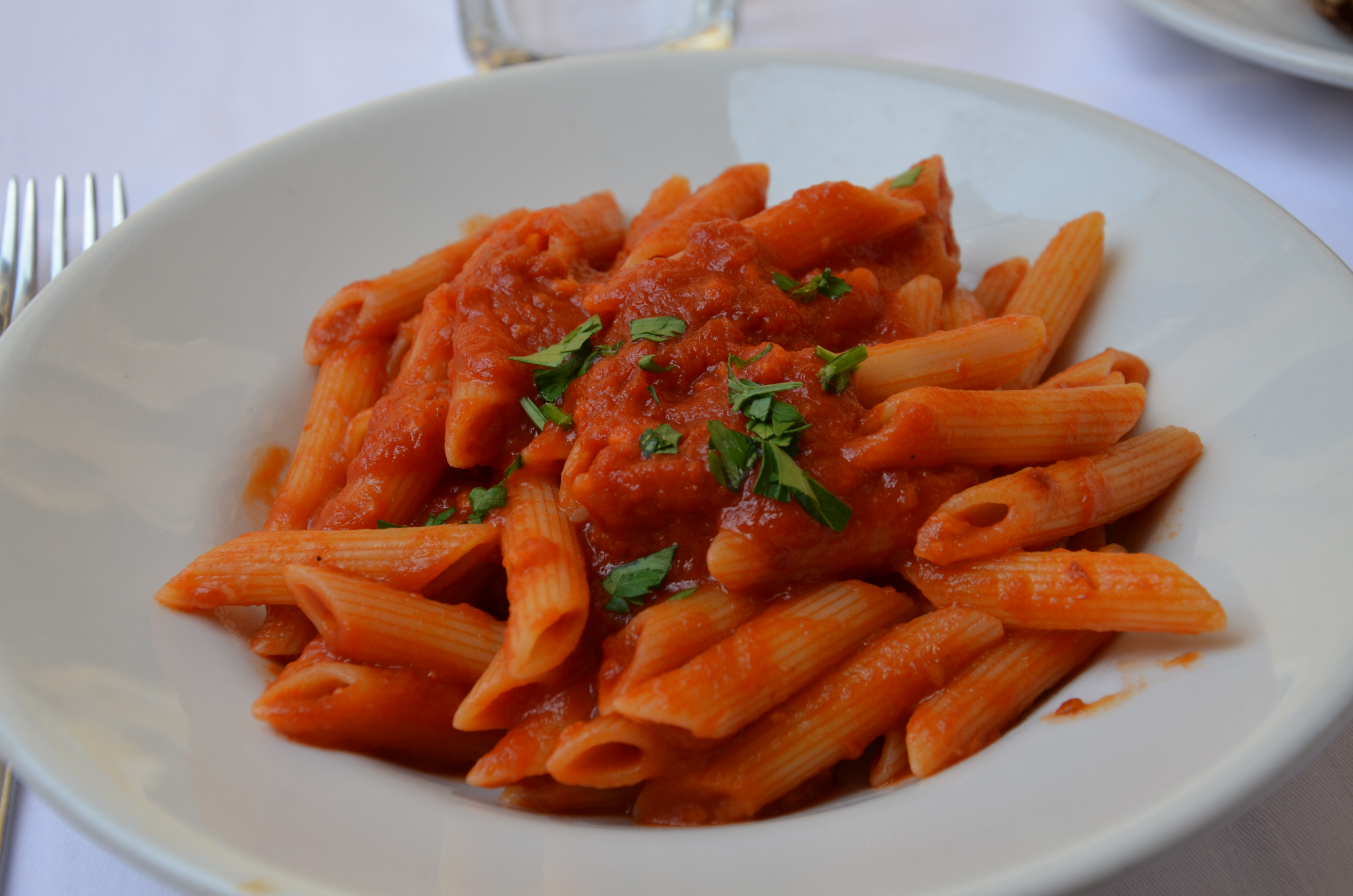 Penne all'arrabbiata, serviert im Restaurant »Da Lucia« in Rom.